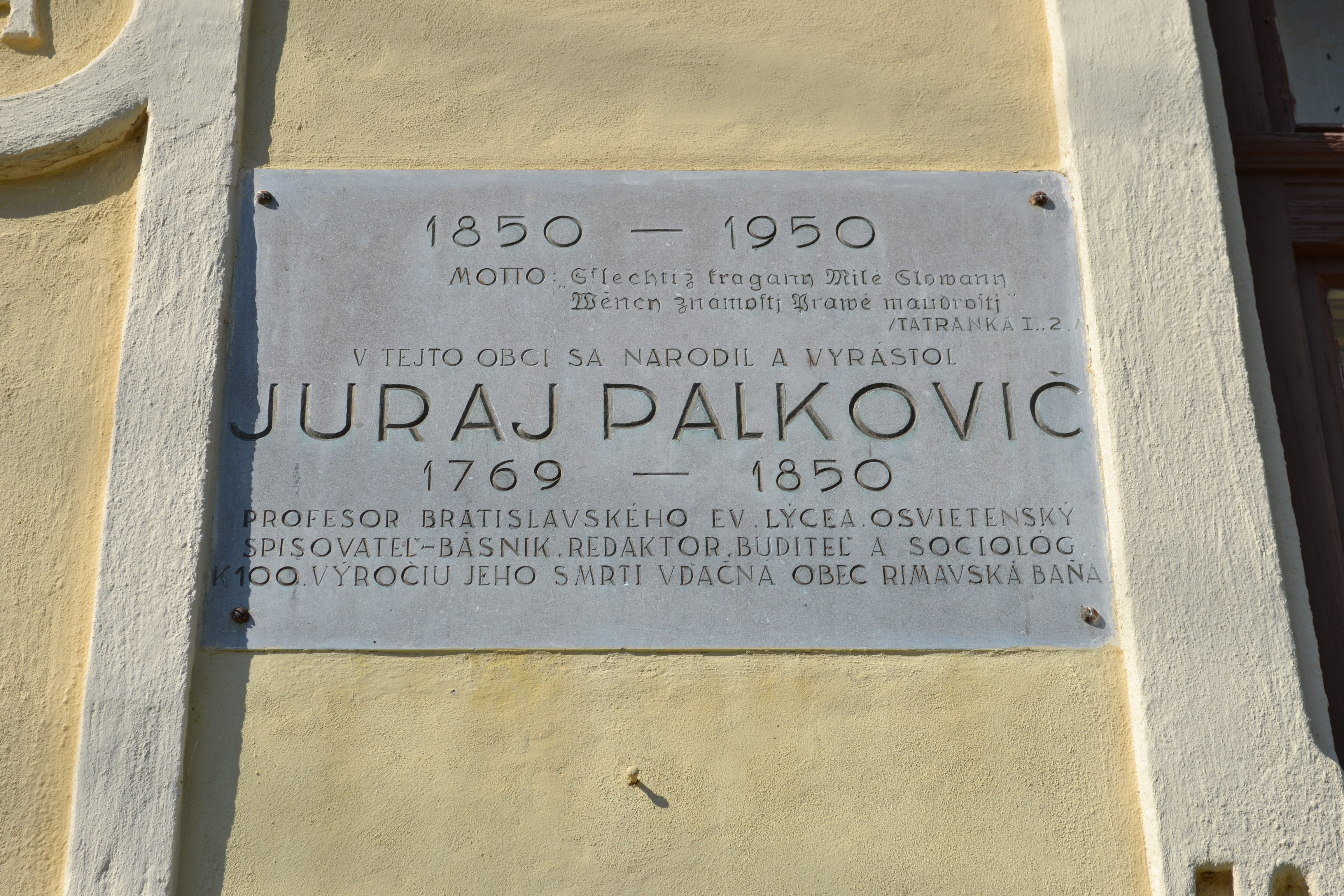 Pamätný dom č. 36, pam. tabuľa miestneho rodáka Juraja Palkoviča